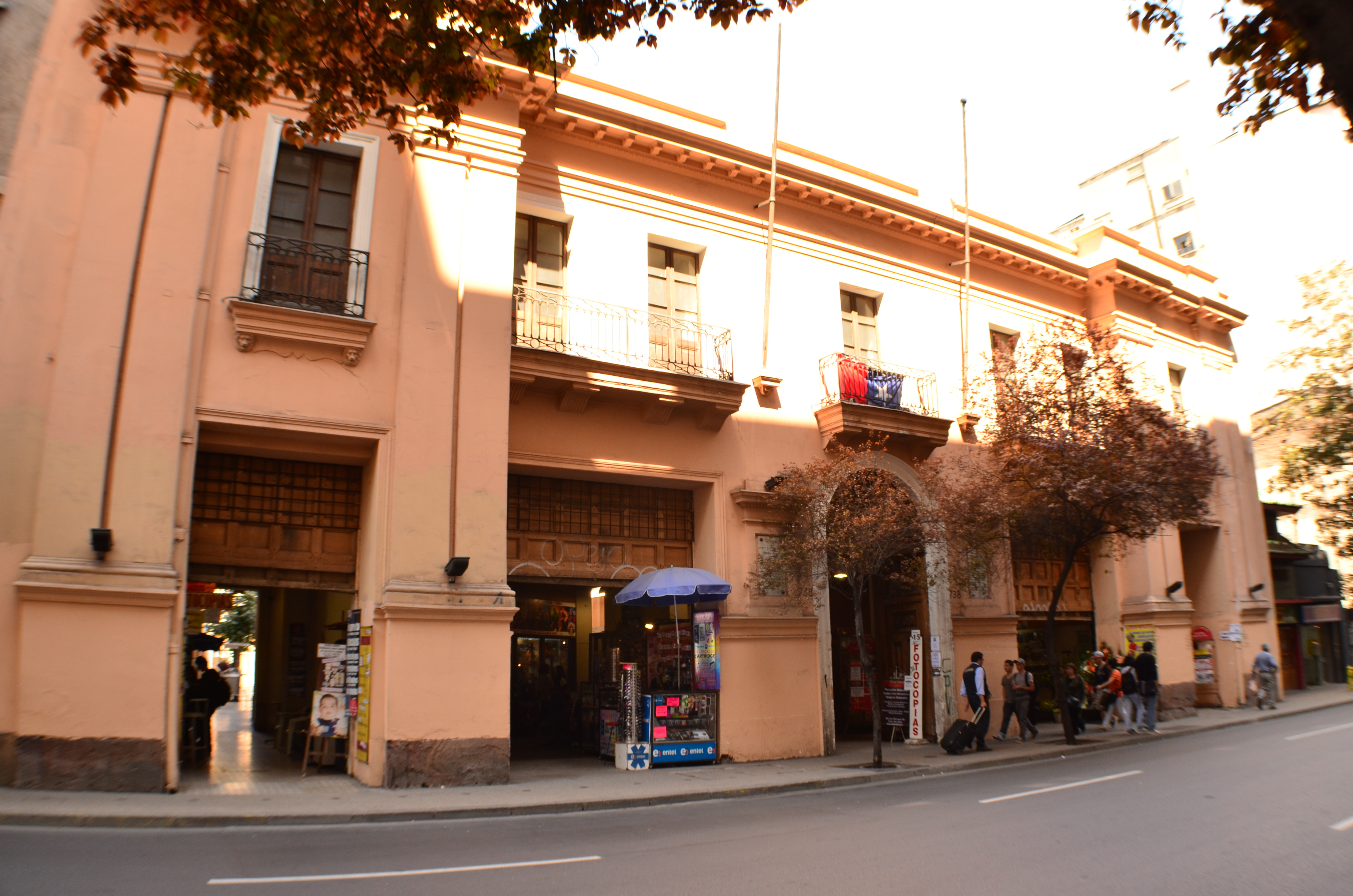 Casa del presidente Manuel Montt This is a photo of a national monument in Chile: 808